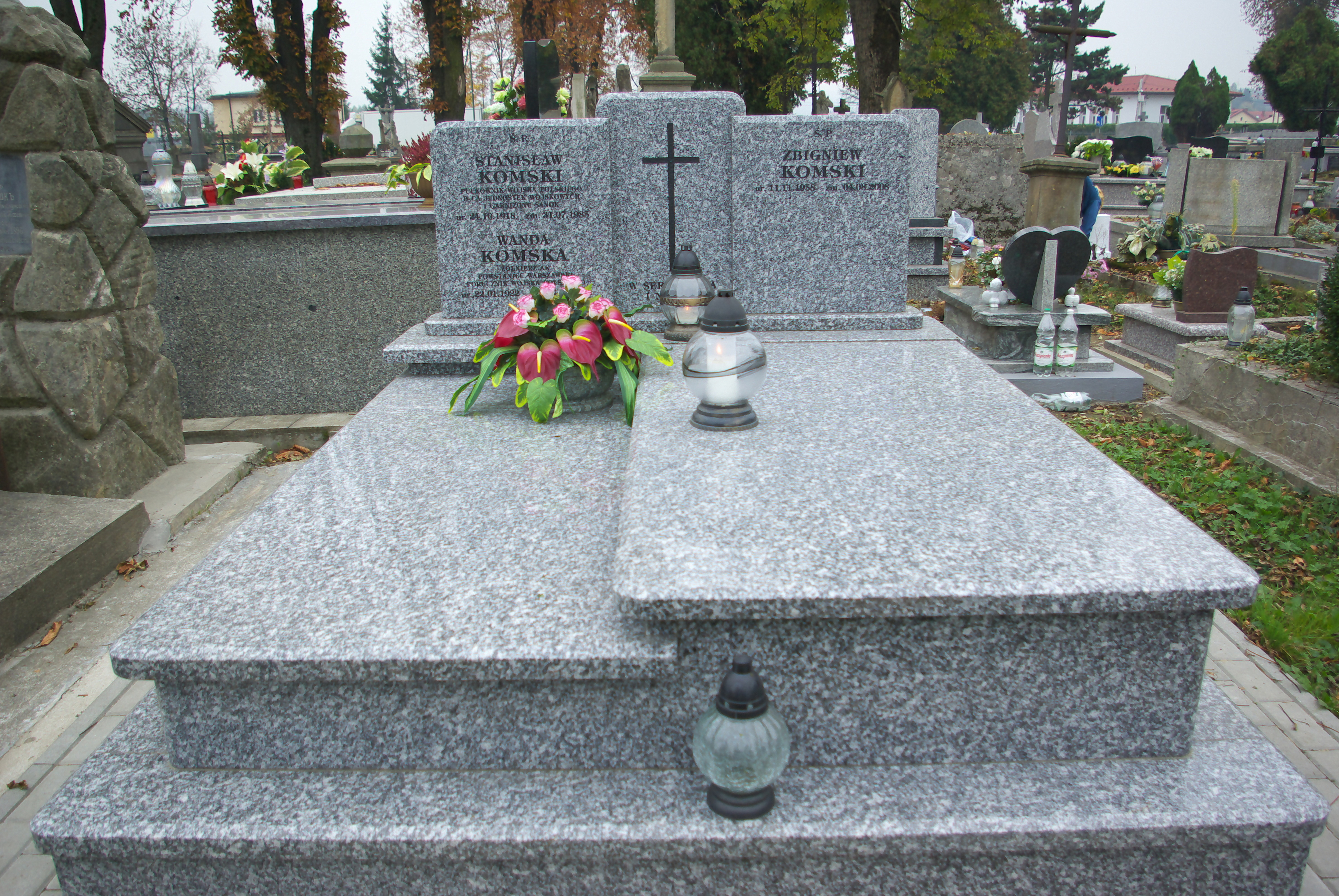 Nagrobek rodziny Komskich na Cmentarzu Centralnym w Sanoku.